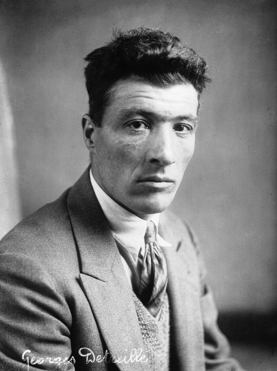 Le Pesage du Tour de France : Georges Detreille : [photographie de presse] / Agence Meurisse